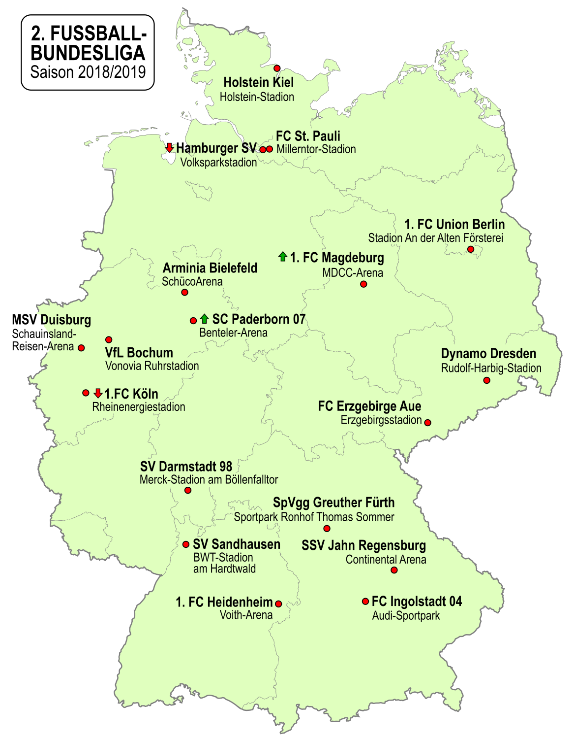 Karte der Vereine der 2. Fußball-Bundesliga-Saison 2018/2019